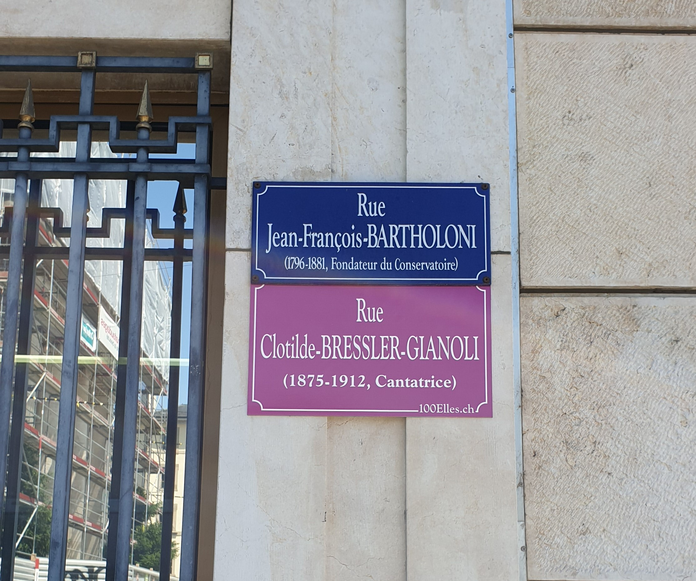 Plaque temporaire de rue apposée dans le cadre du projet 100elles à Genève en 2019